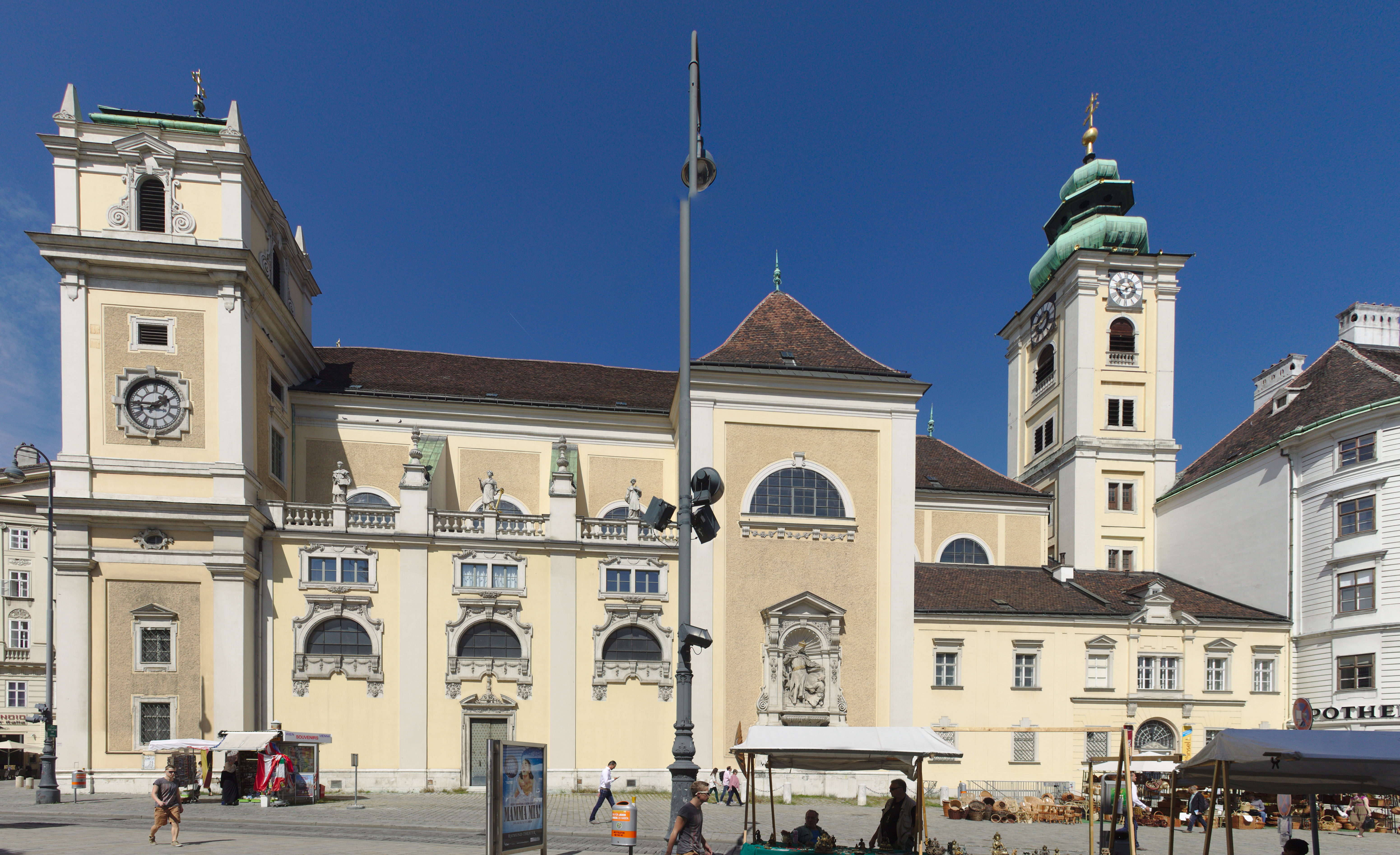 Gesamtanlage Schottenstift samt Pfarr- und Stiftskirche